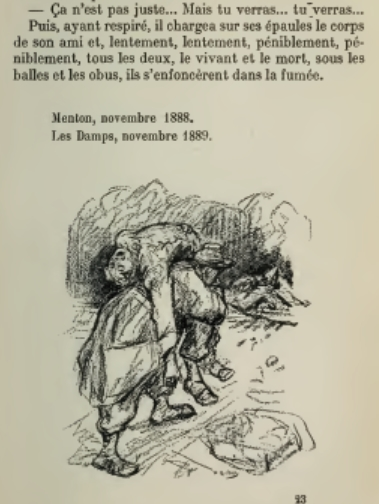 Illustration d'Henri-Gabriel Ibels (1867-1936) pour "Sébastien Roch", roman d'Octave Mirbeau (1848-1917). Éditions Fasquelle, 1906.